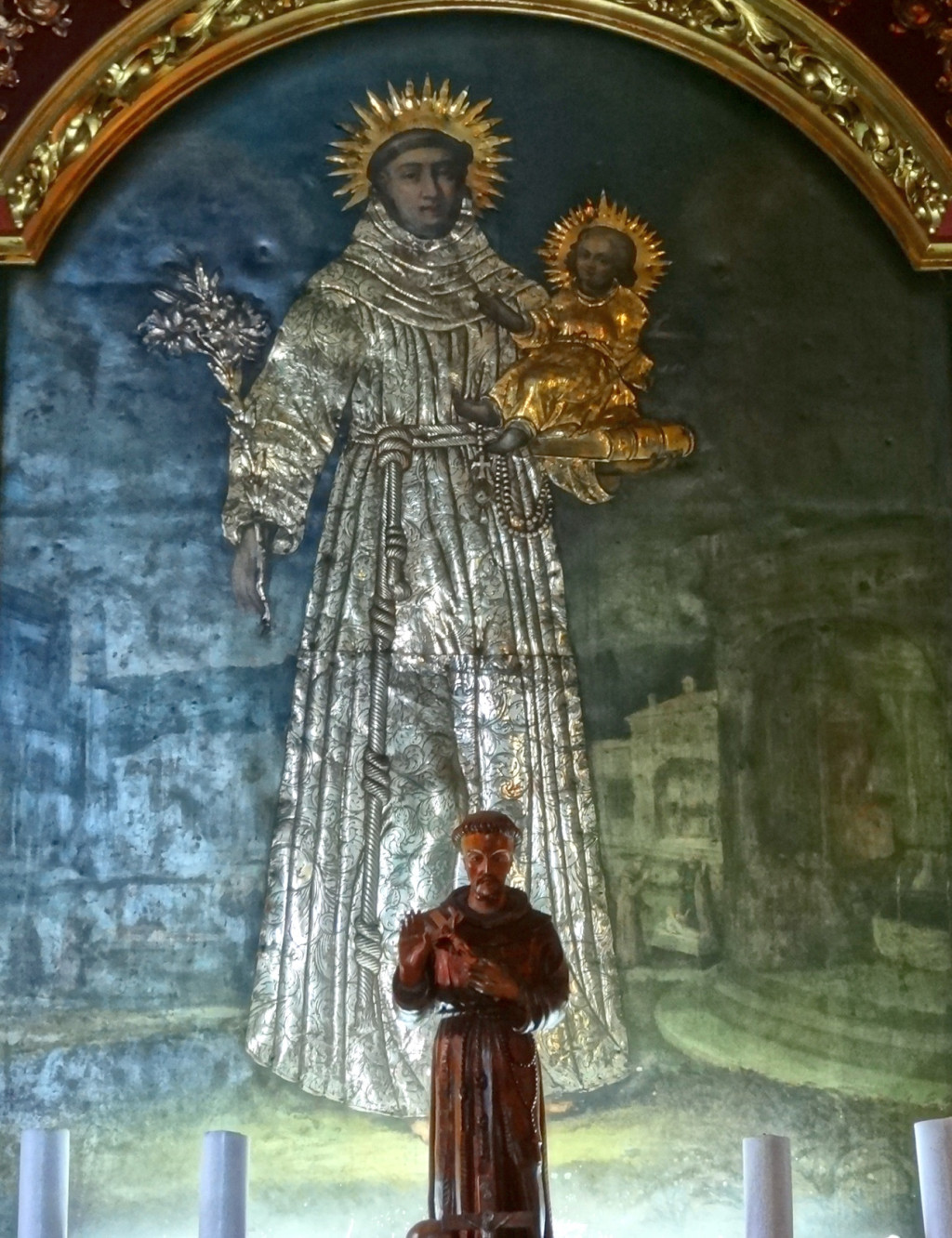 Ołtarz św. Antoniego z Padwy (pocz. XVIII w.) z malowanym na blasze barokowym obrazem św. Antoniego z Dzieciątkiem (2. poł. XVI w., szkoła florencka, pochodzący z kościoła bernardynów bydgoskich), ze srebrną sukienką (1. poł. XVIII w.); w górnej kondygnacji obraz Opłakiwanie (pocz. XIX w.), a na niej tabernakulum relikwiarzowe (poł. XVII w., przekształcone).